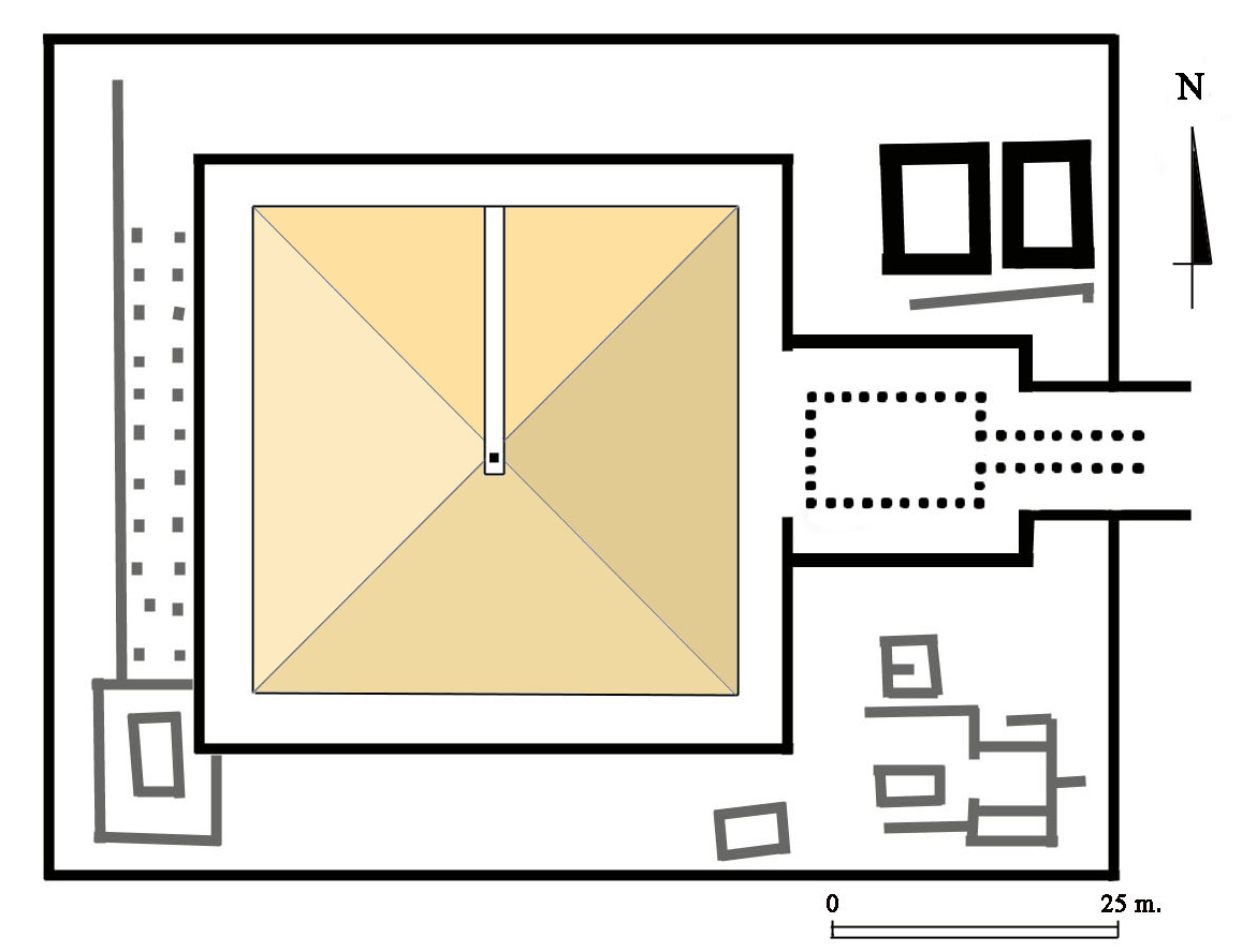 Plan des Pyramidenkomplexes des Amenemhet I. Plan du complexe funéraire d'Amenemhat Ier à Licht